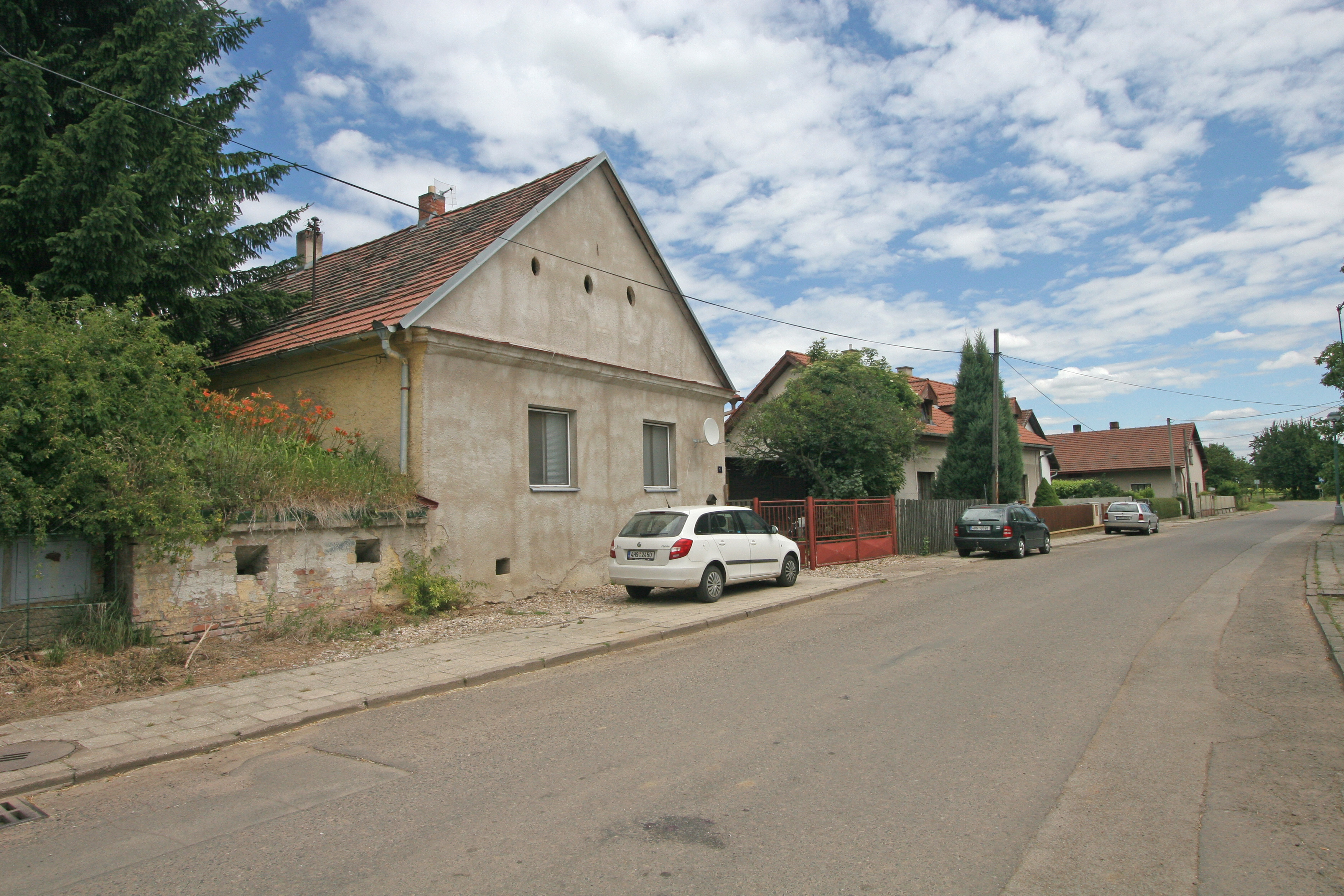 Dlouhé Dvory čp. 1